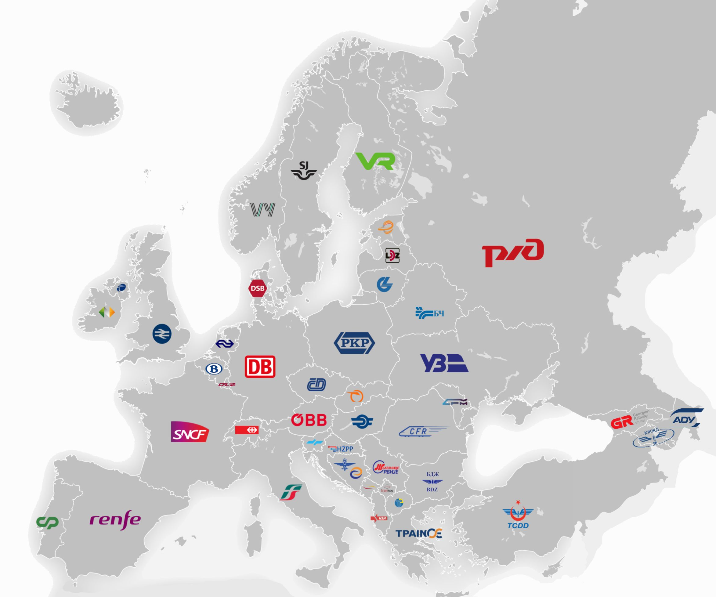 Die Karte beinhaltet die Logos aller großen staatlichen Eisenbahnen Europas (Stand: 09. Mai 2019).